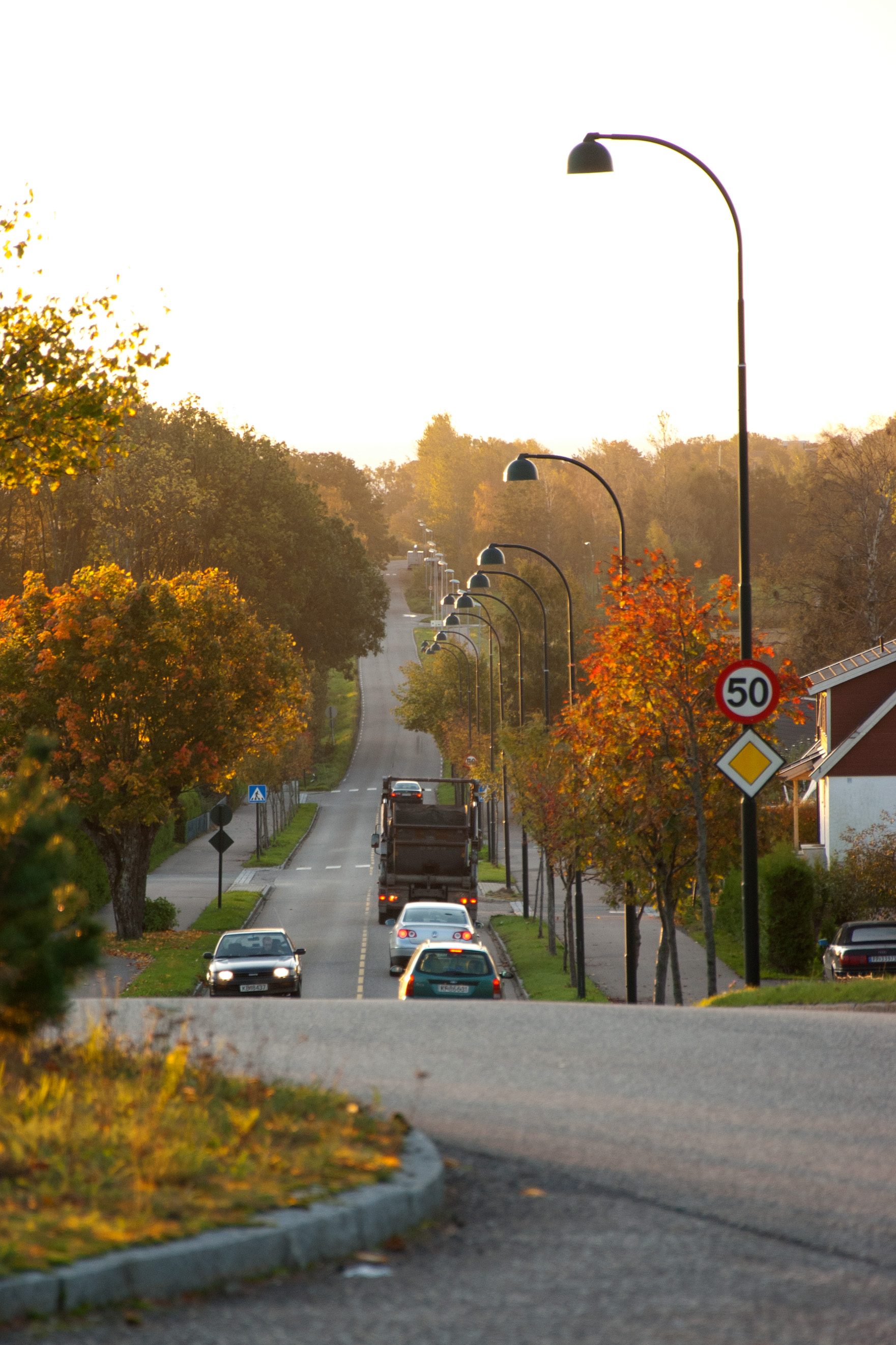 Fylkesvei 510 Valløveien i Tønsberg, Vestfold